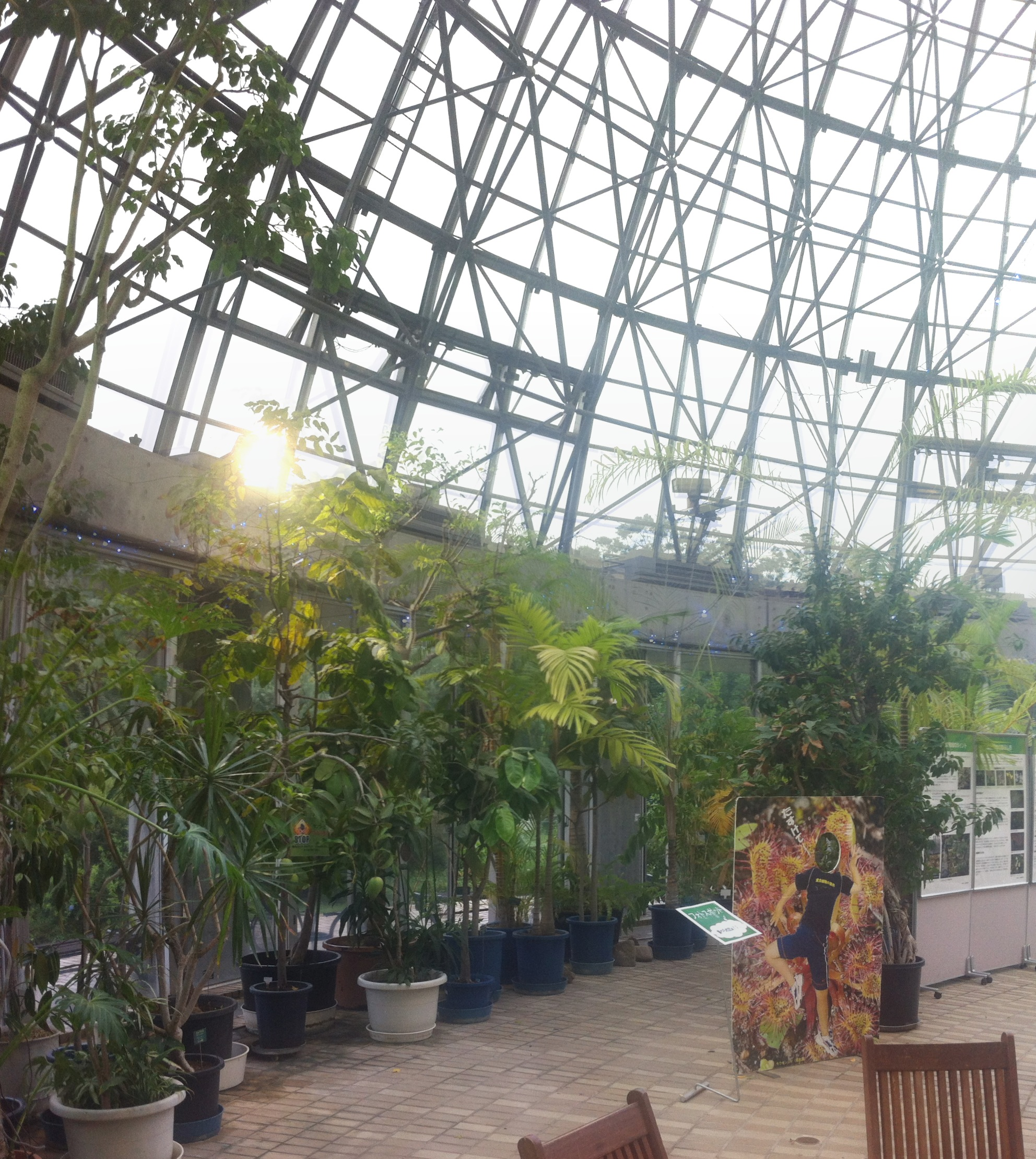 夢の島熱帯植物館の中 Inside yumenoshima tropical botanical garden